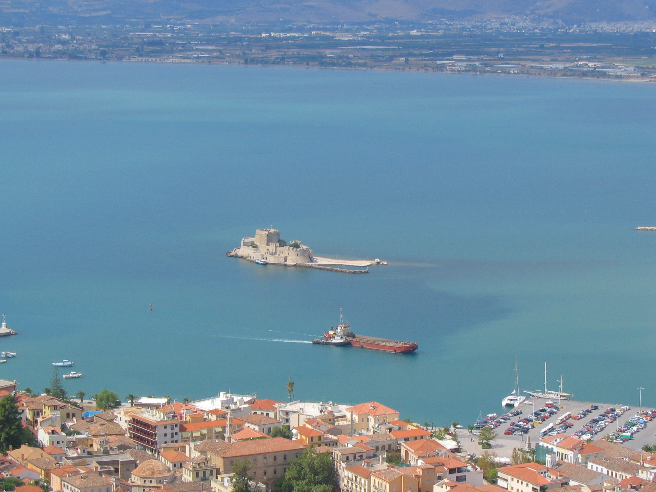 Форт Бурдзи (Нафплион) из крепости Паламиди